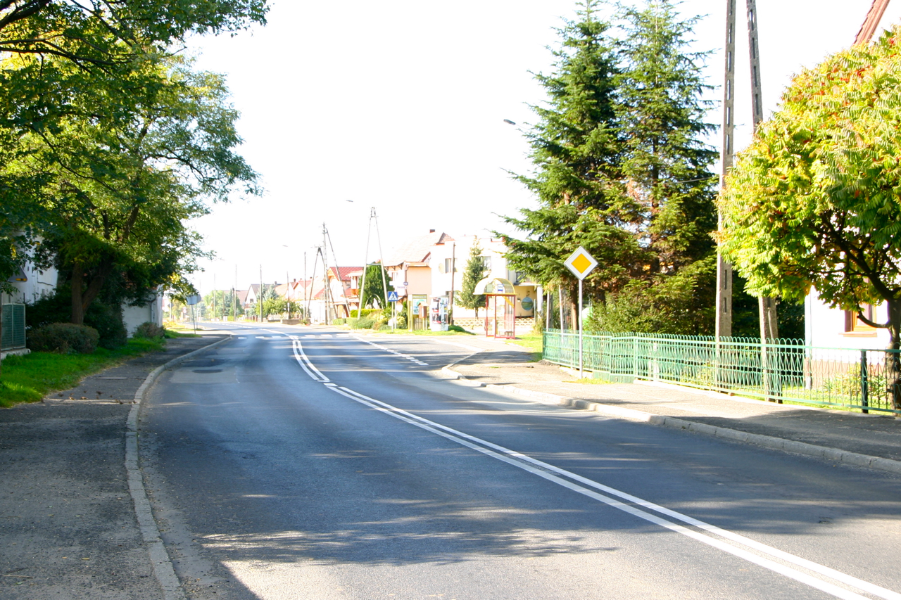 Stare Kotkowice (dodatkowa nazwa w j. niem. Alt Kuttendorf) – wieś w Polsce położona w województwie opolskim, w powiecie prudnickim, w gminie Głogówek.